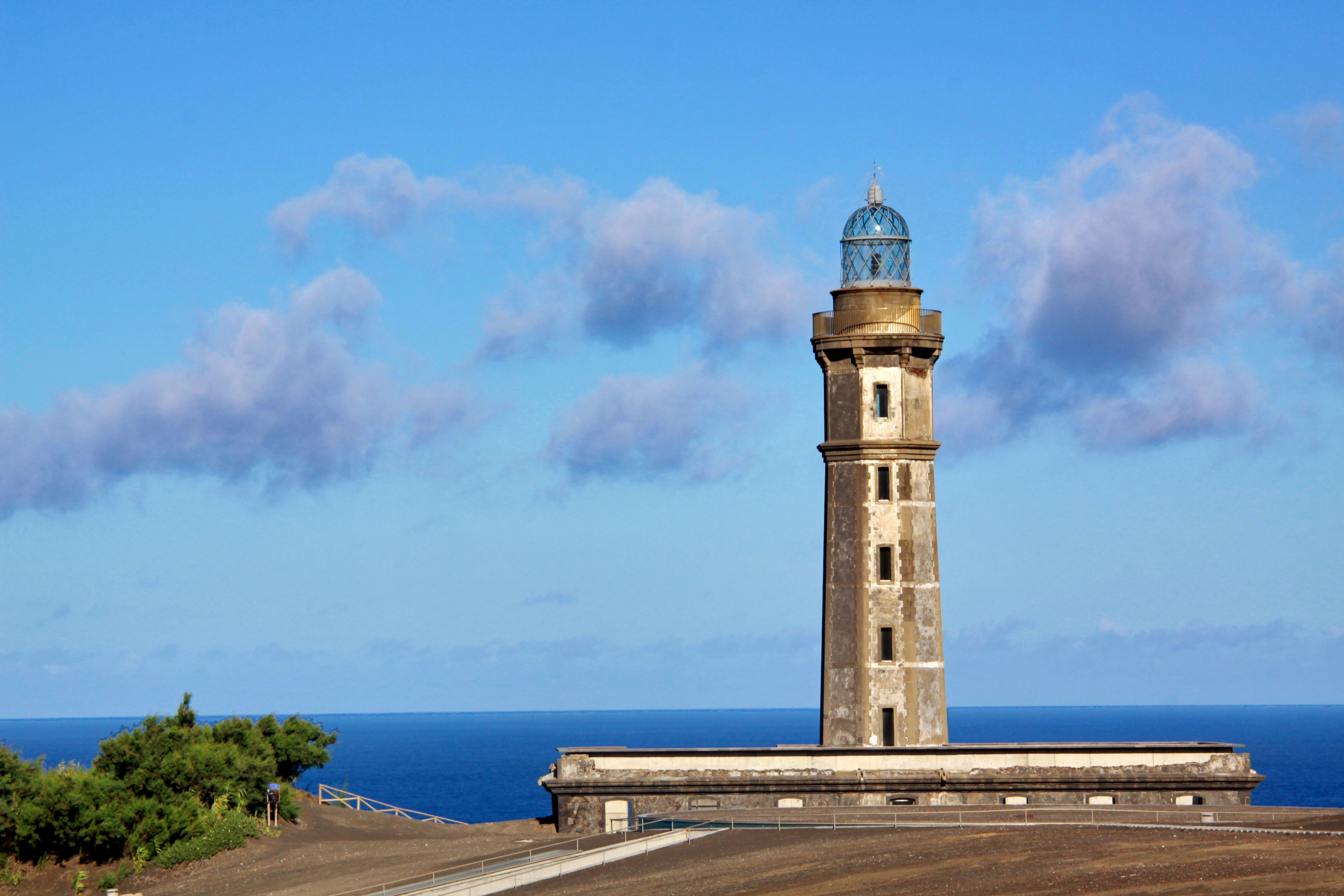 Ilha do Faial, Açores. Le phare de Capelinhos.